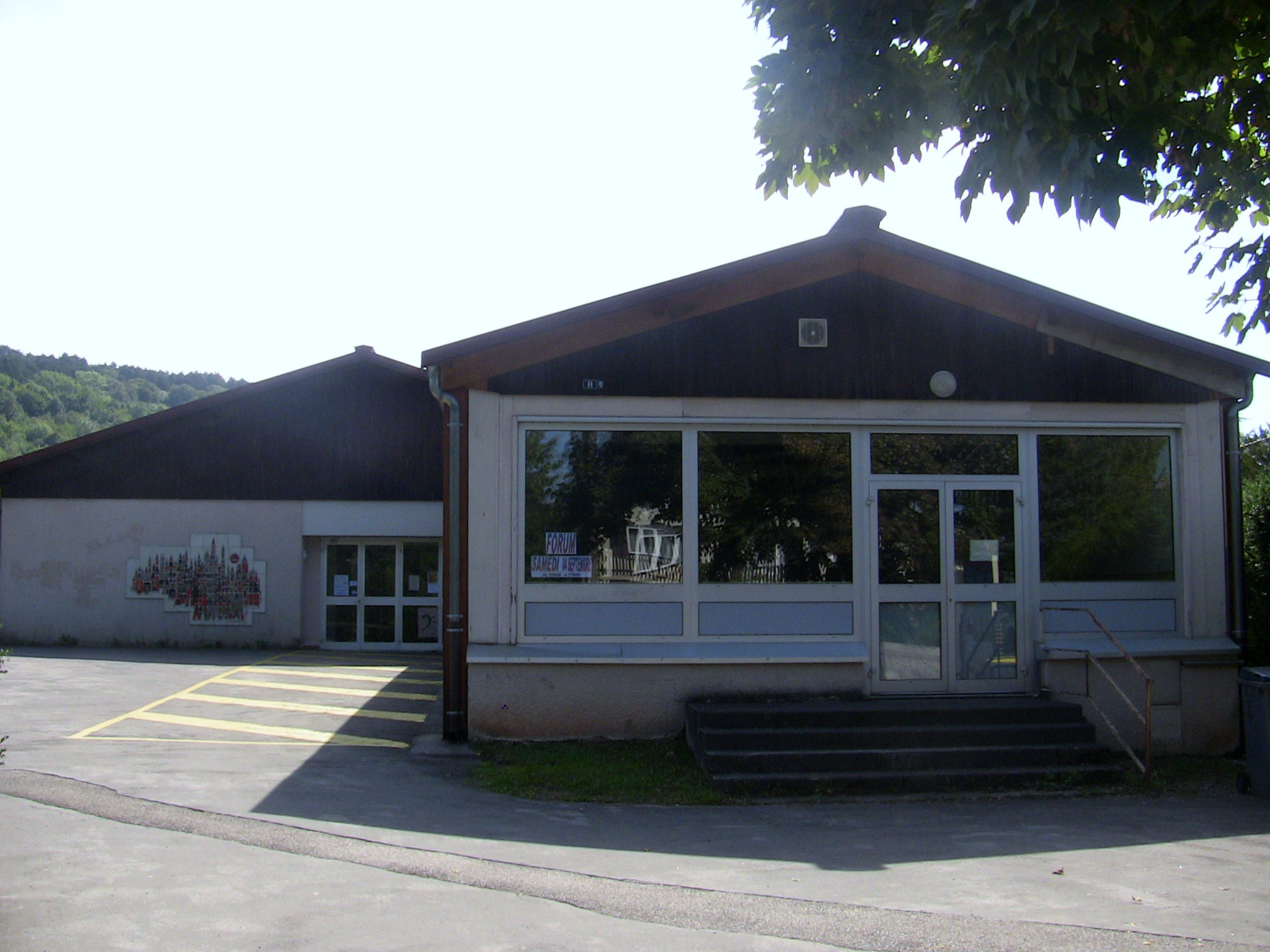 La maison de quartier de Bregille, à Besançon (Doubs, France).